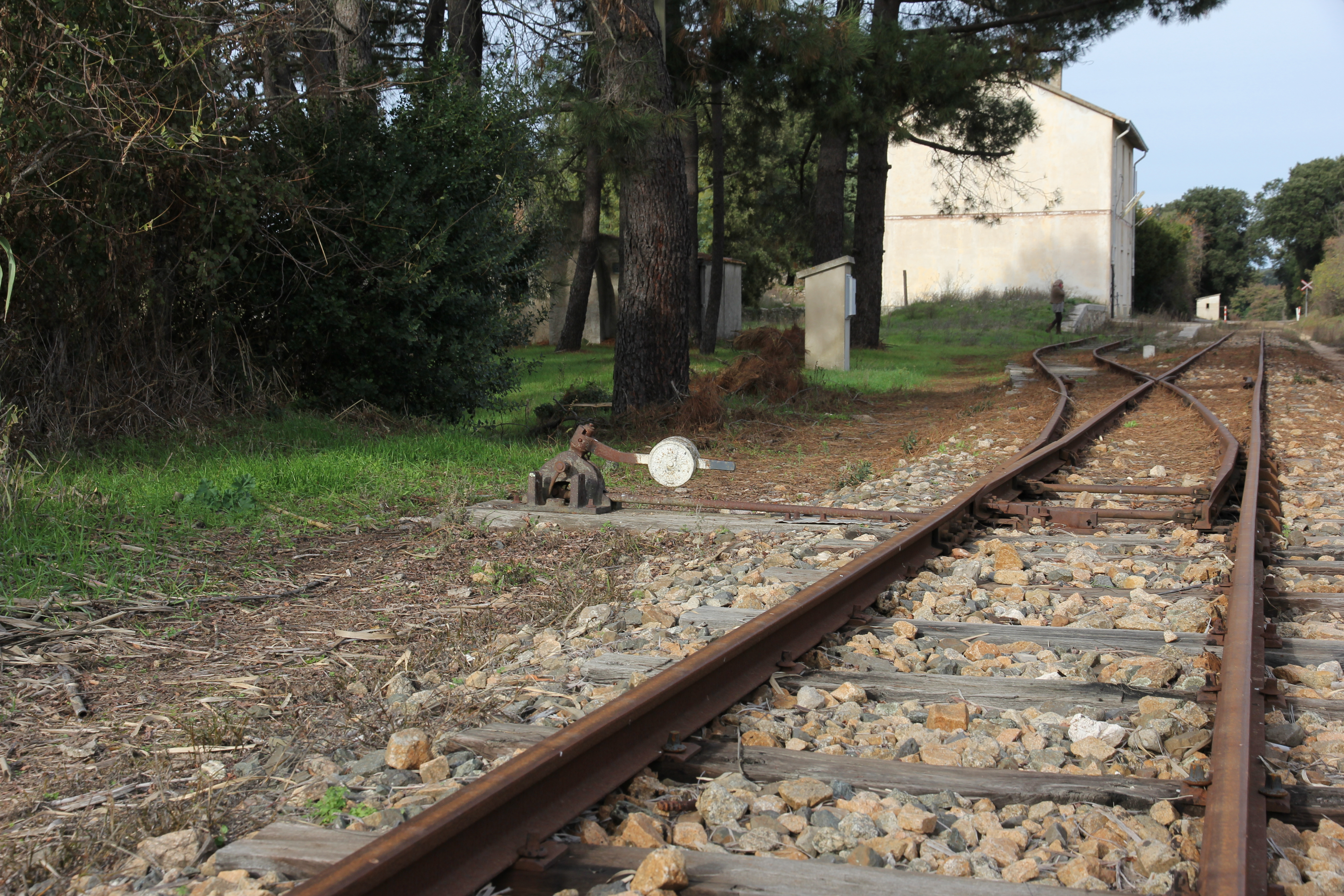 Stazione ferroviaria di Nuchis